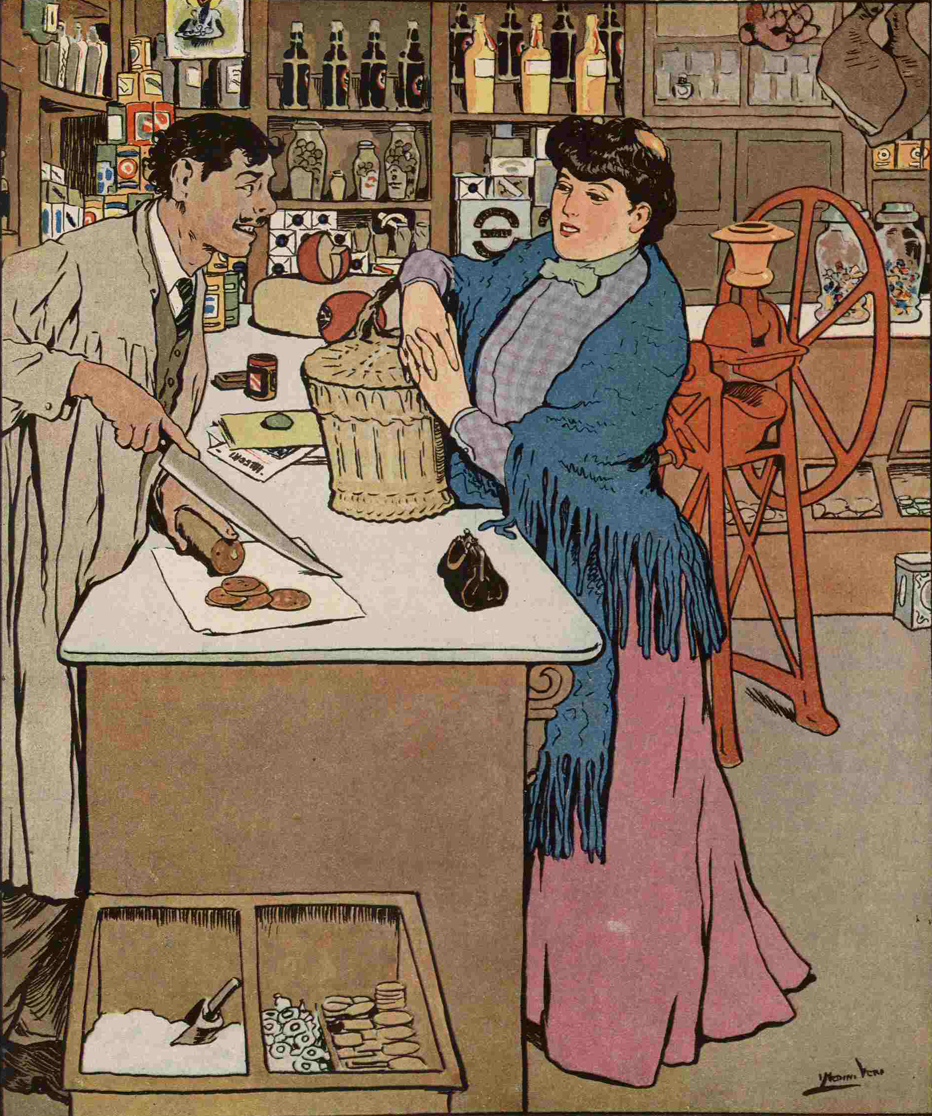 En la tienda.